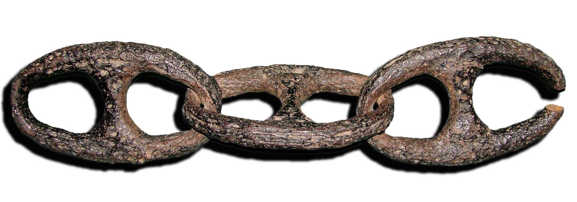 Eslabones originales de las cadenas colocadas entre ambos márgenes del Río Paraná, a la altura del sitio denominado Vuelta de Obligado (hoy San Pedro, Provincia de Buenos Aires) para bloquear el paso de la escuadra anglo-francesa, defendiendo la soberanía argentina en la gesta conocida como Combate de la Vuelta de Obligado, el 20 de noviembre de 1845.